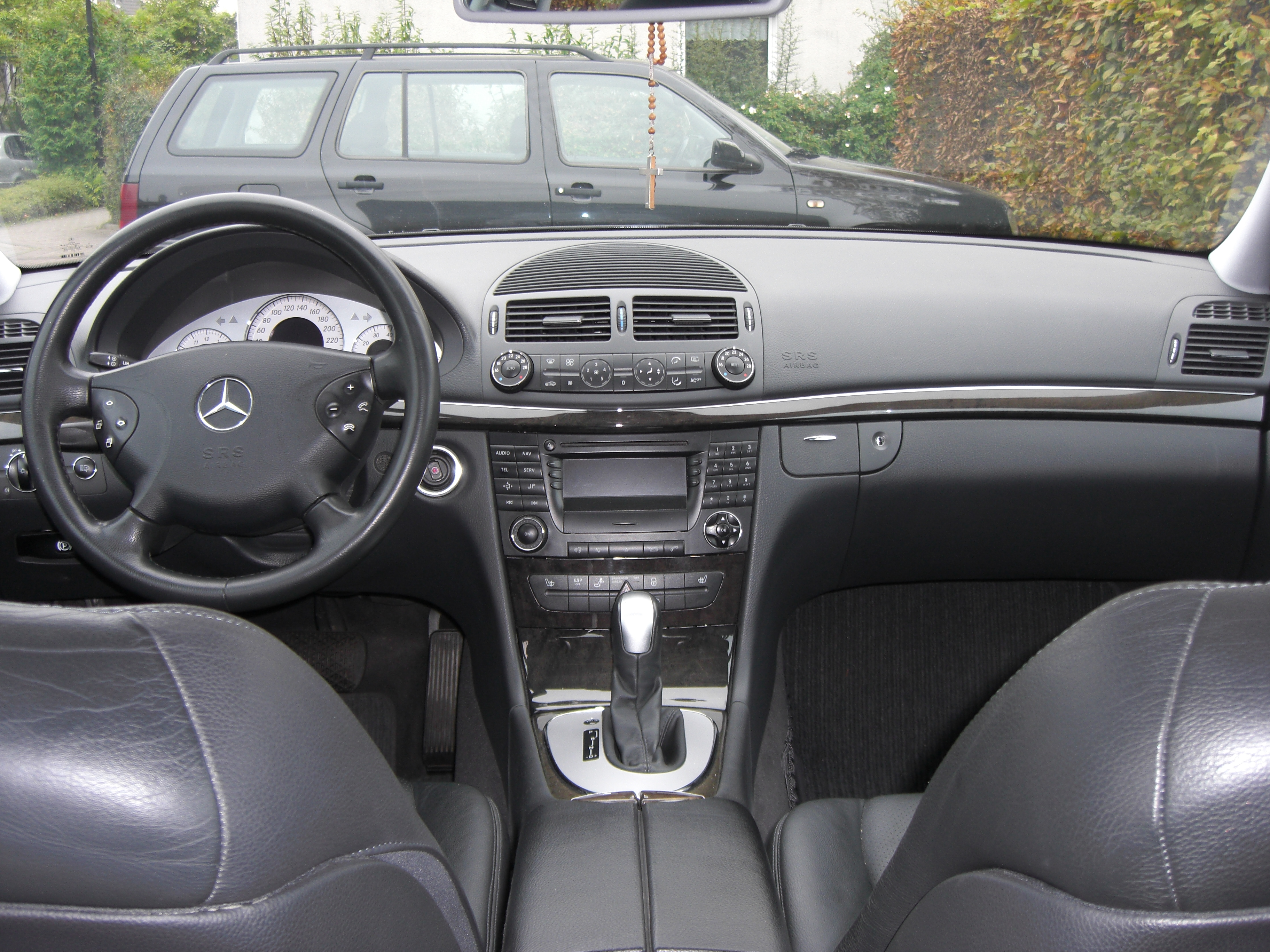 Description: Mercedes E 240 Avantgarde W211 Cockpit („aus eigener Hand“) Source: Matthias